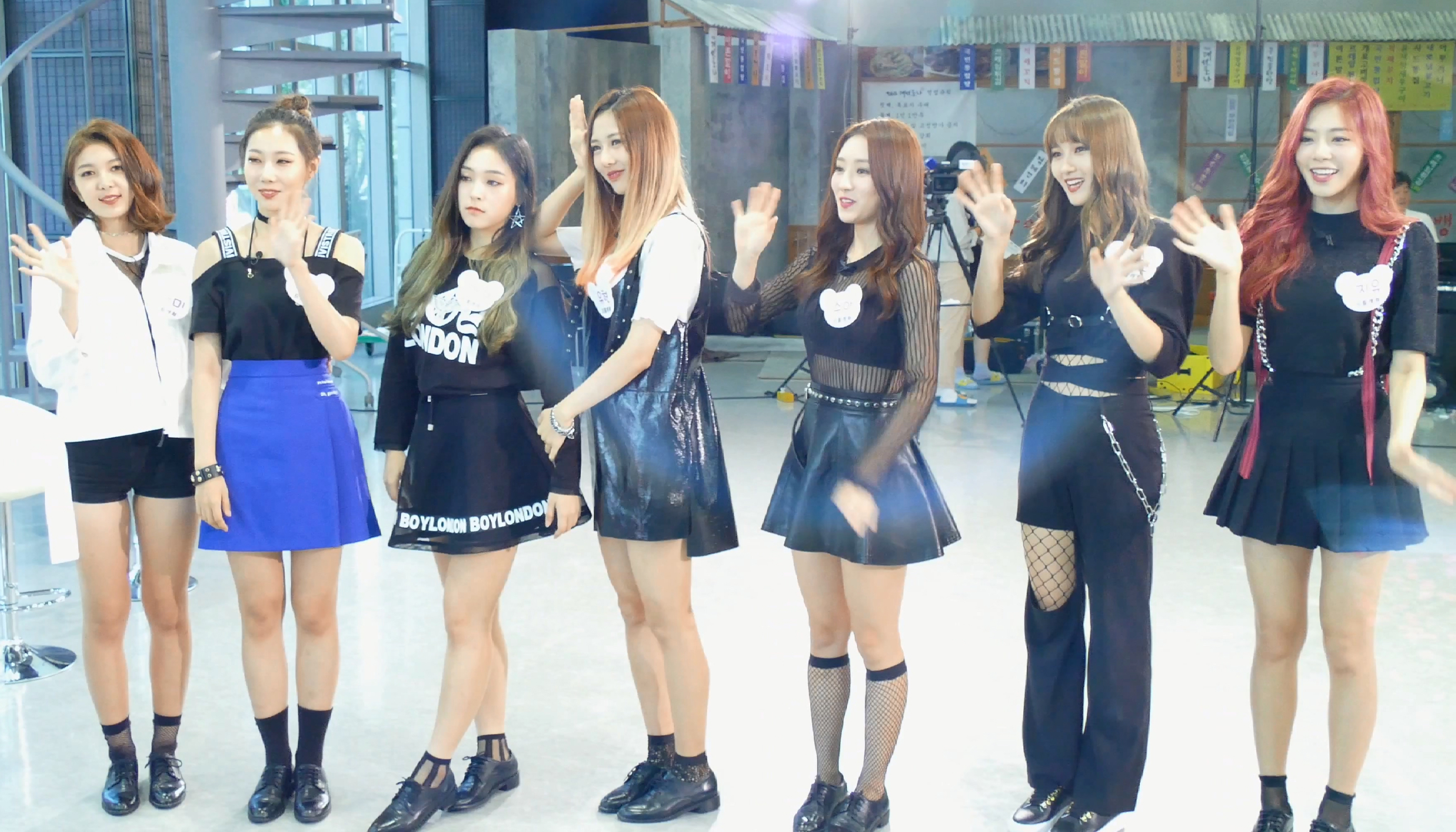 170822 상암 드림캐쳐 직캠 18 DREAMCATCHER tbs 팩트in스타 10s